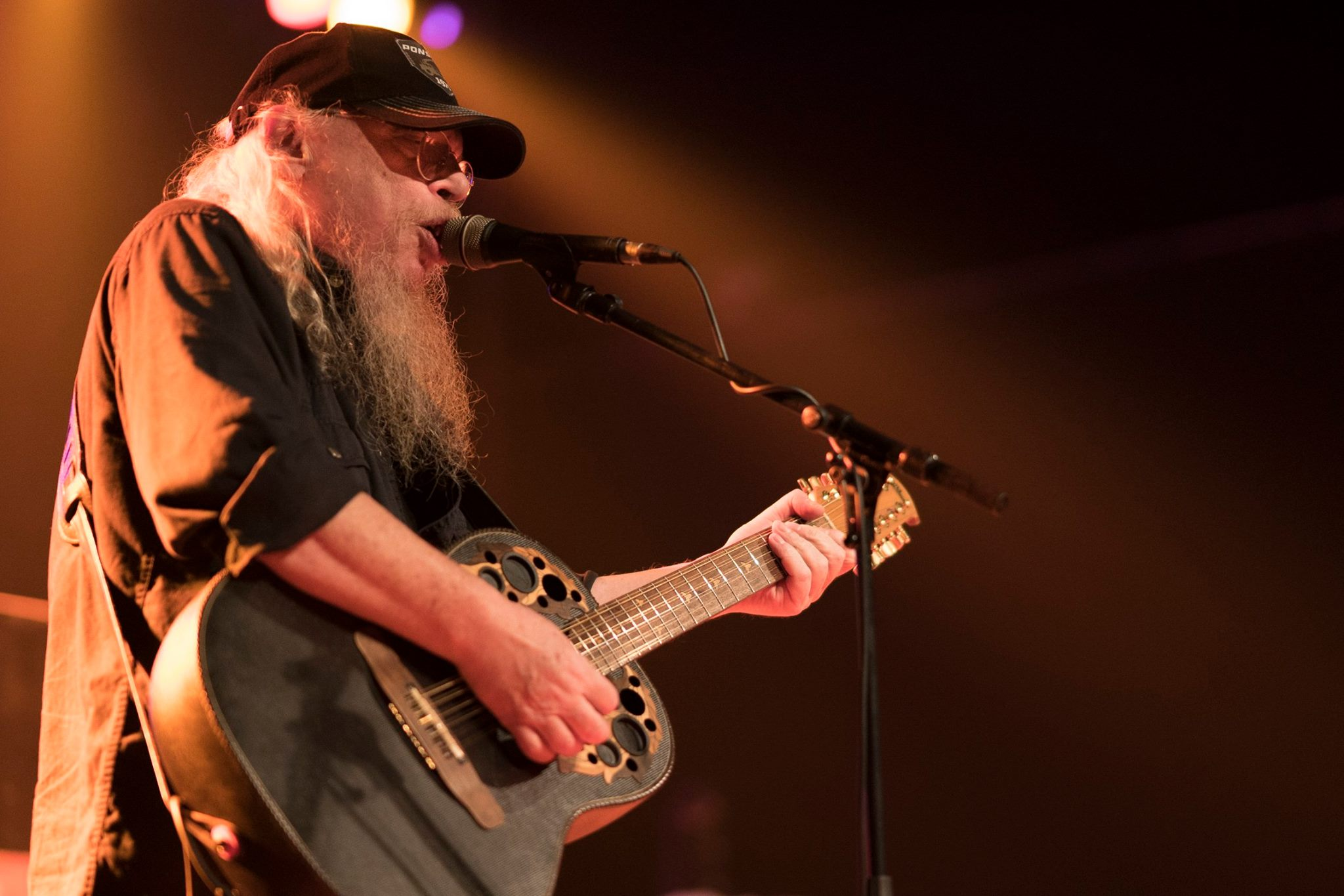 Raymond Voß am 08.12.2017 live im Pier 2 in Bremen